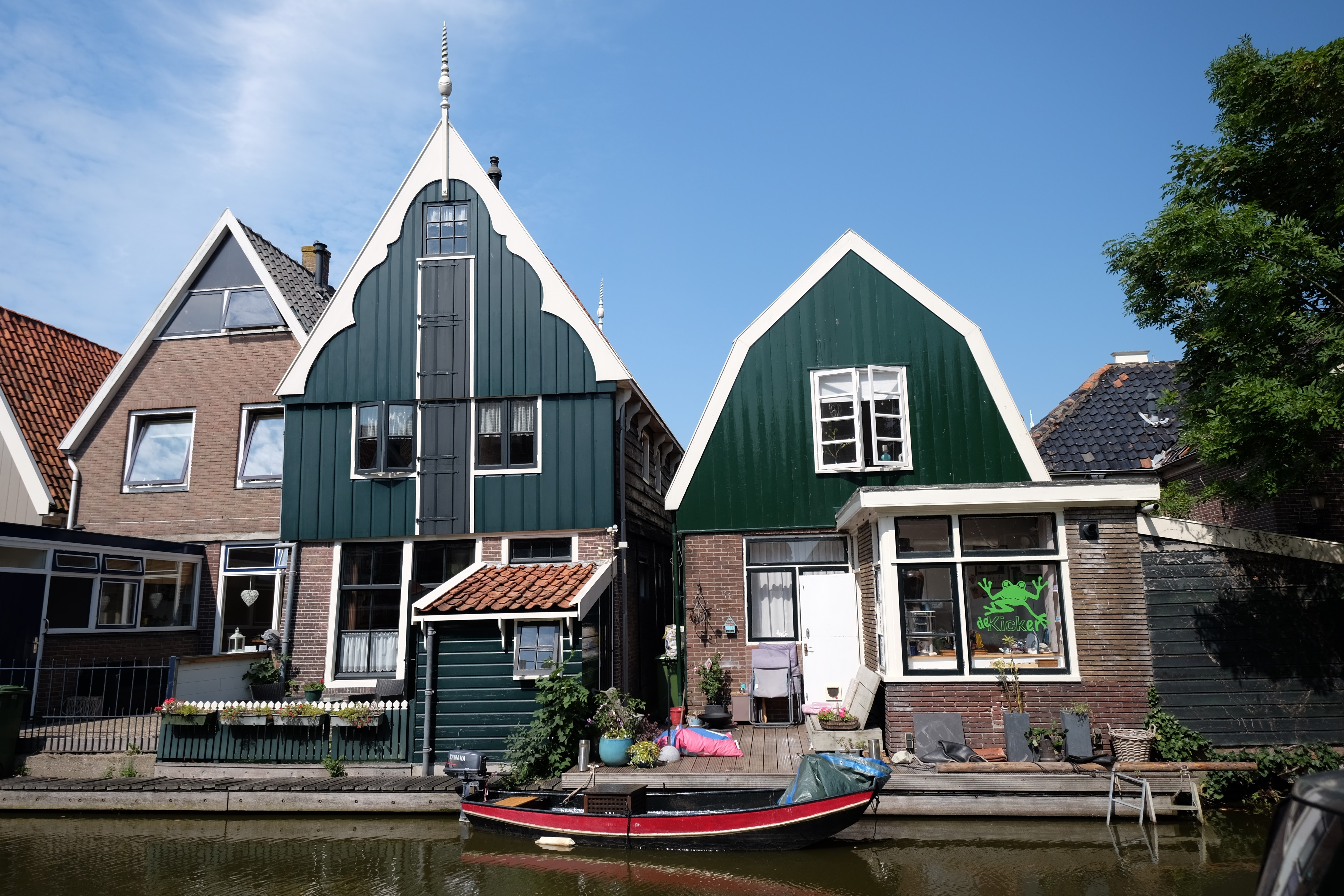 1483 De Rijp, Netherlands